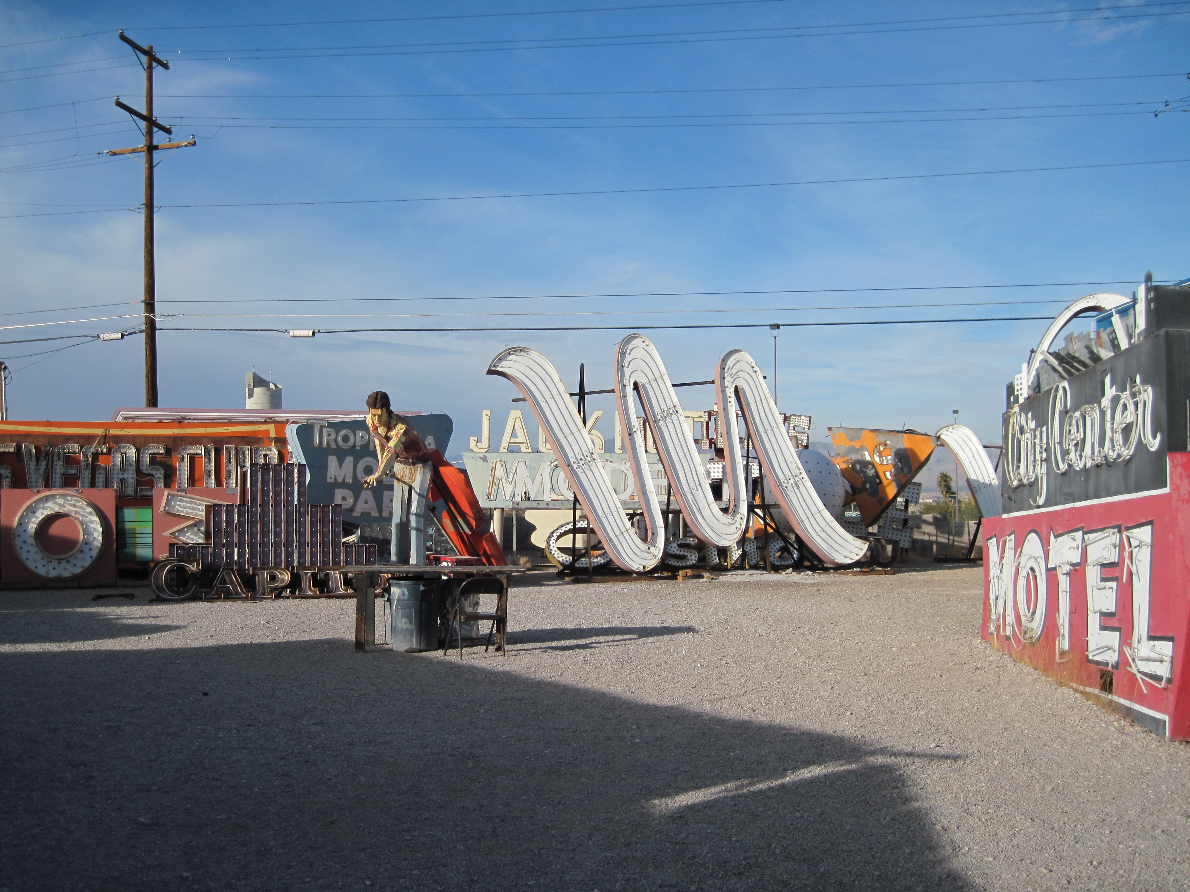 Las Vegas 2009_25